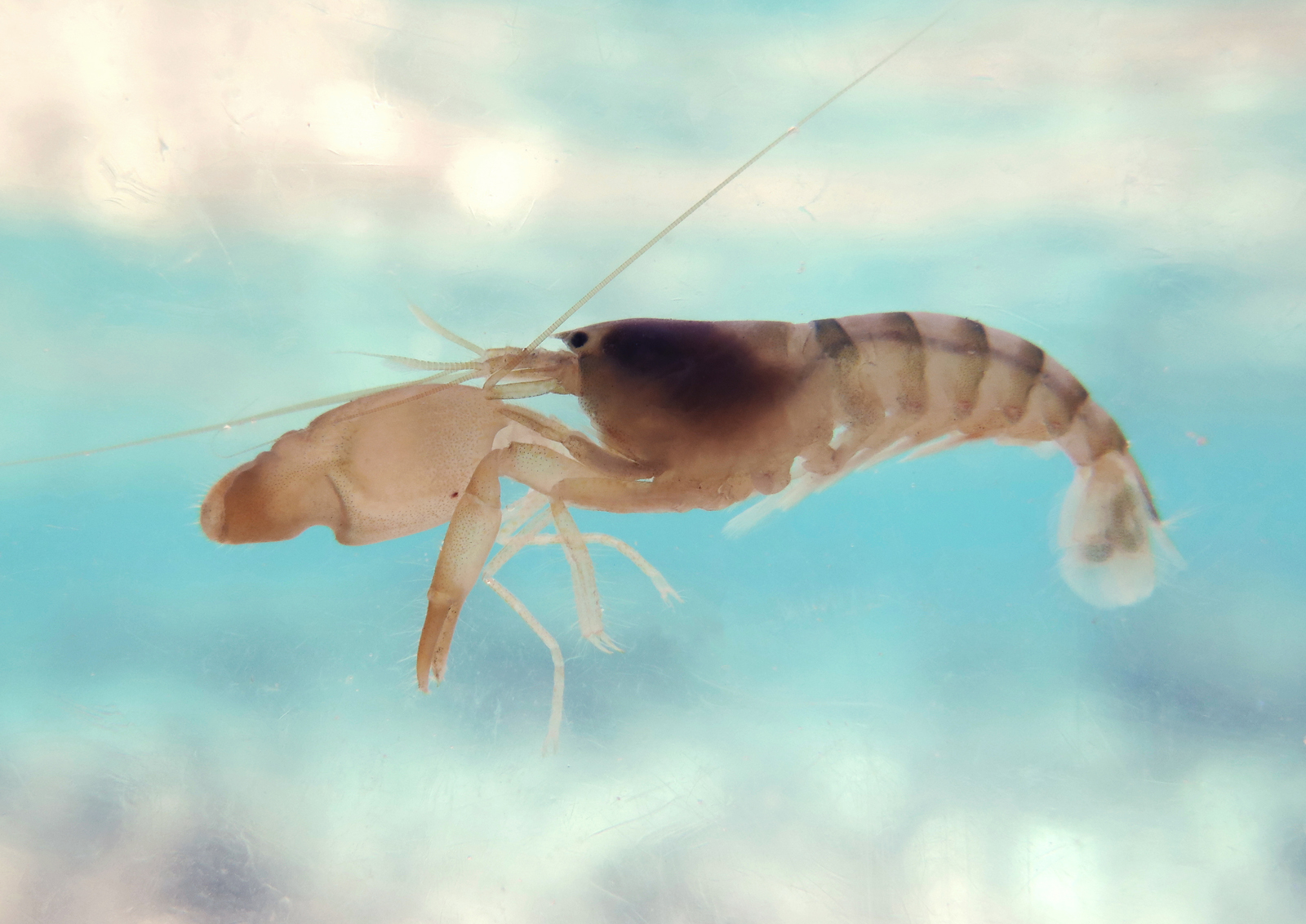 Une crevette Alpheus leviusculus à la Réunion.